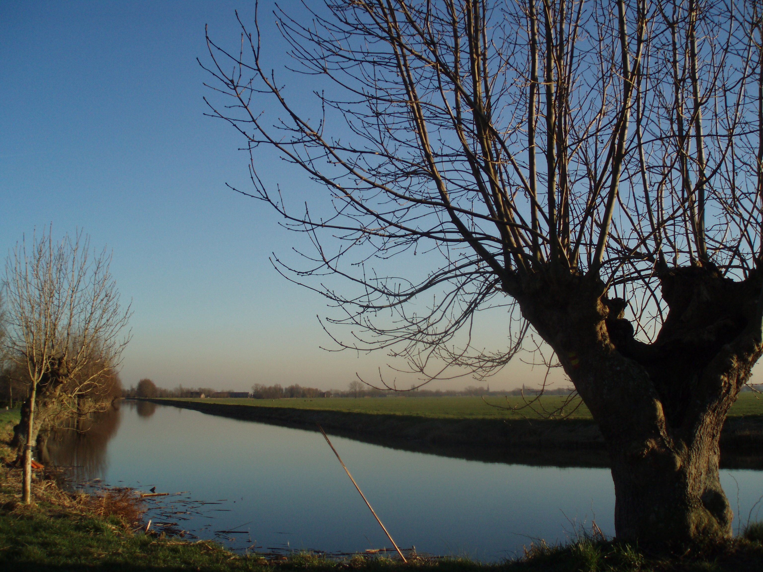 De Montfoortse Vaart op een zonnige februaridag, gezien vanaf de Cattenbroekerdijk.